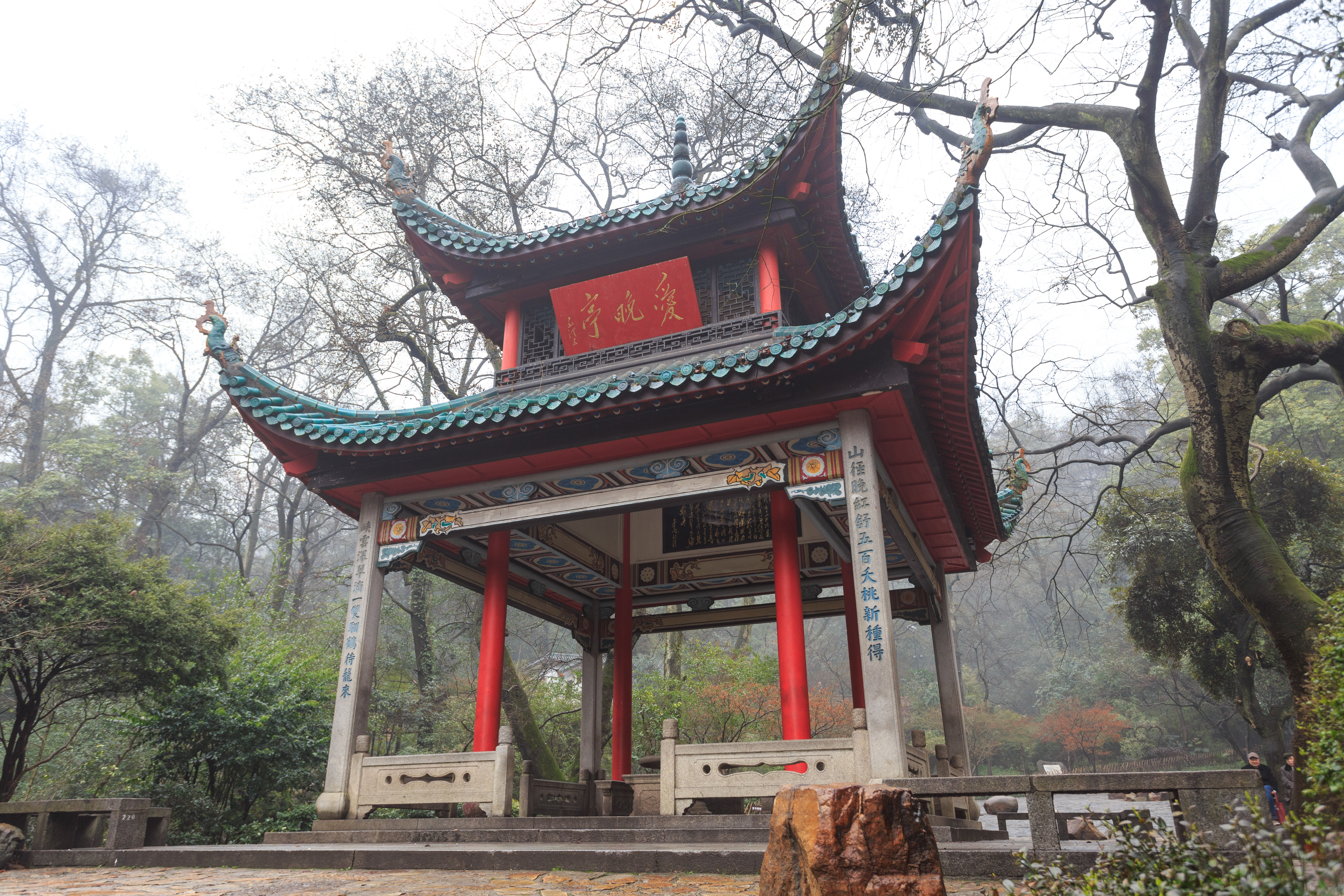 长沙岳麓山——爱晚亭